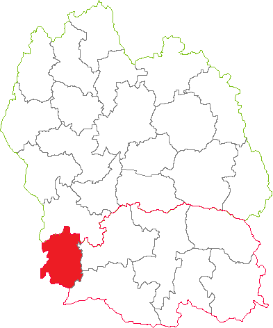 Situation du canton dans le département de la Lozère (France)